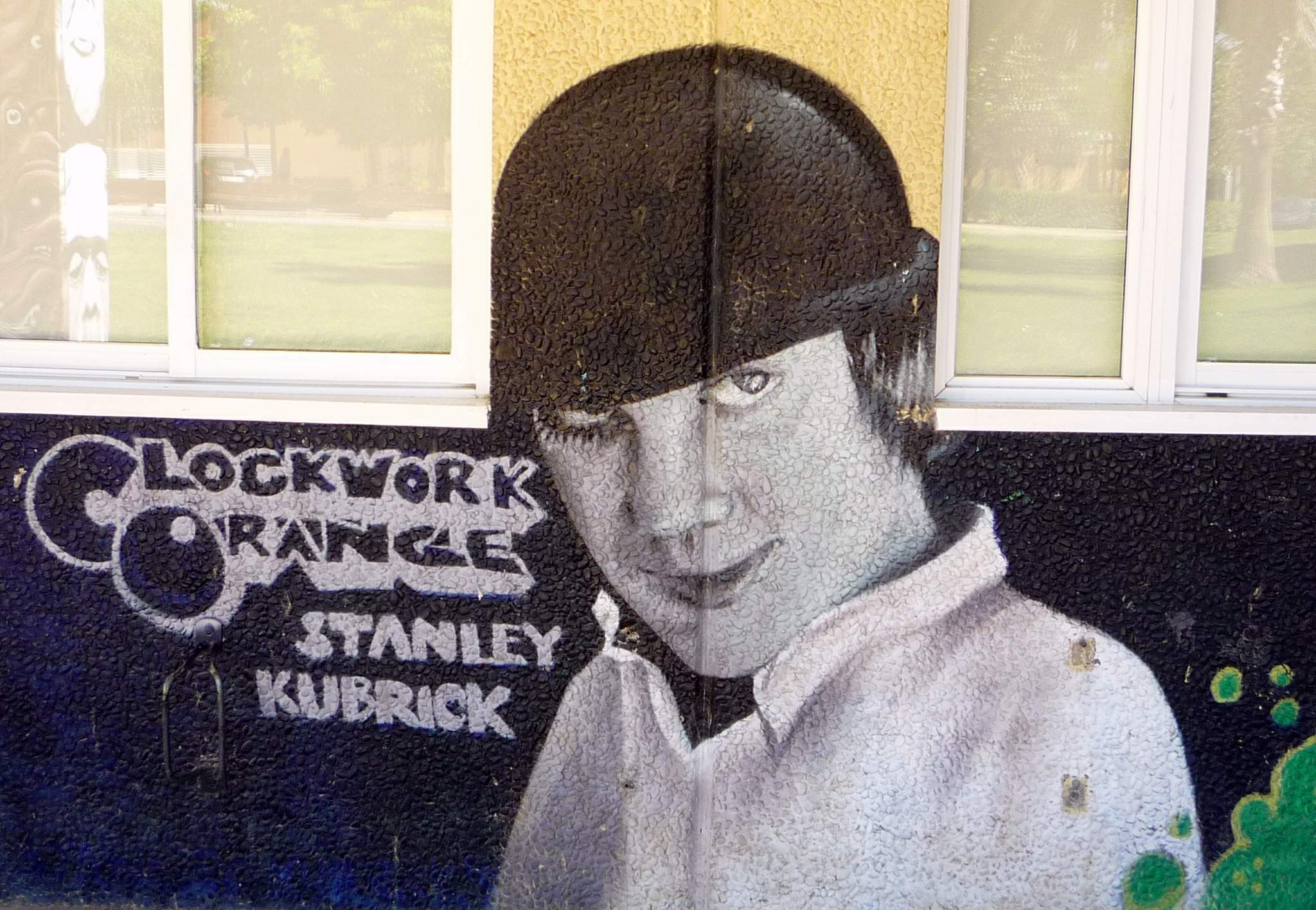 Graffiti en Sant Just Desvern (Barcelona)